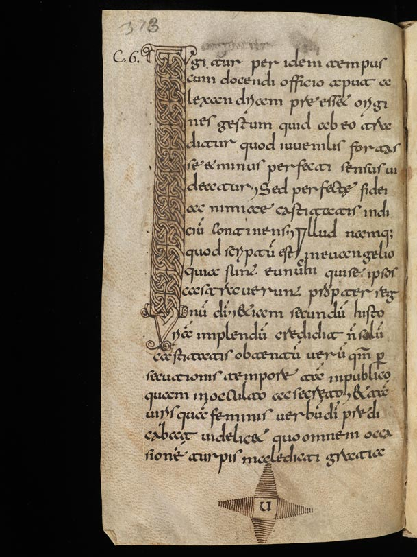 Cod. Eins. 347, Majuskel-I mit Verzierungen in irischem Stil, S. 313